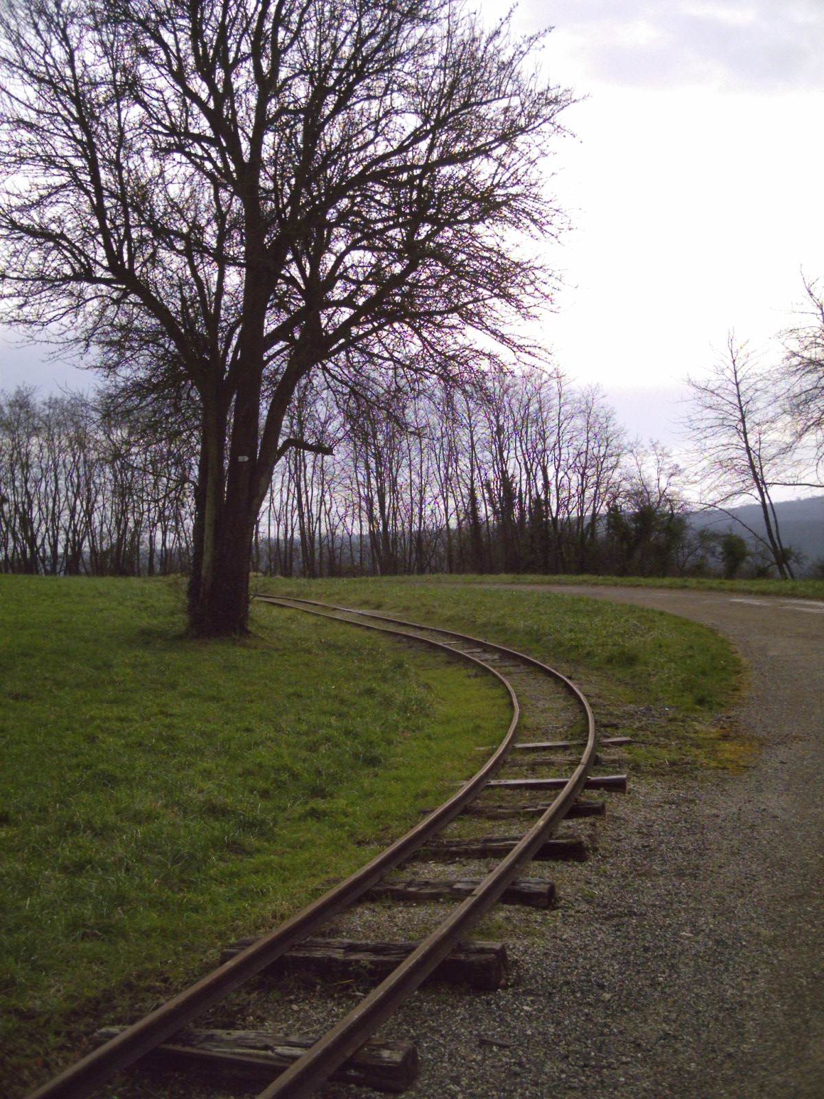 Rail autour du fort de Villey-le-Sec